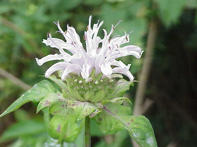 Species: Monarda fistulosa Family: ' Image No. 1